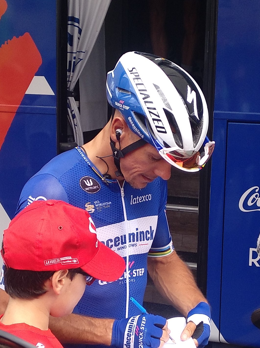 Philippe Gilbert, del equipo Deceuninck-Quick Step, firmando autógrafos en la salida en Bilbao en la 13ª etapa de la Vuelta a España 2019